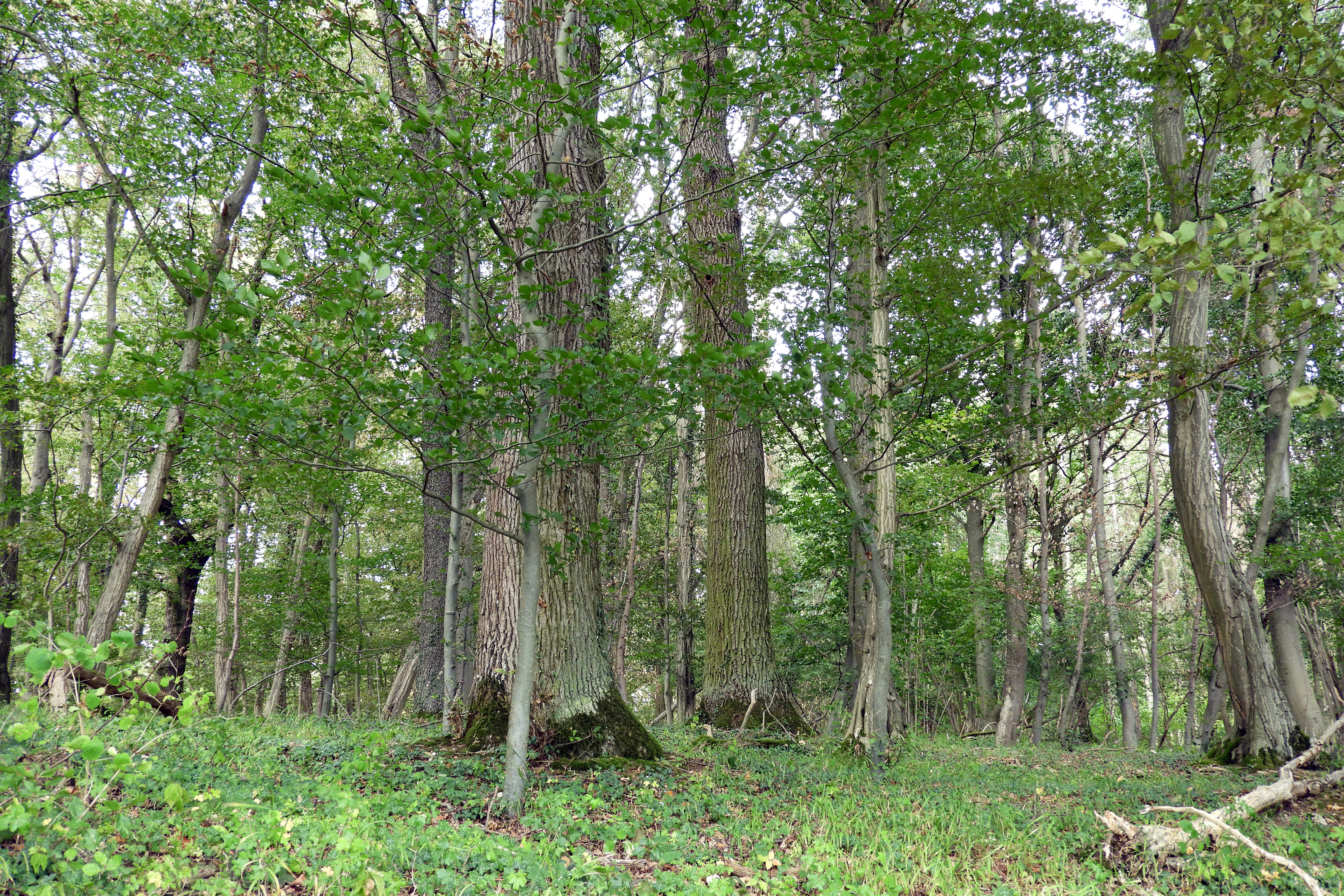 Der „Ermschwerder Heegen“ ist eine, in das untere Tal der Werra hineinragende Erhebung aus Muschelkalk im nordhessischen Werra-Meißner-Kreis. Er erstreckt sich über eine Höhenlage von 132 bis 235 m und besteht aus einem bewaldeten Bereich, einem Feuchtgebiet, Kalkmagerrasen, Streuobstbeständen und landwirtschaftlich genutzten Flächen. Wegen seinem artenreichen Altholzbestand und einem großen Sumpfbiotop mit dem Vorkommen seltener Pflanzen-, Insekten- und Vogelarten wurde der „Heegen“ im Dezember 1985 als Naturschutzgebiet ausgewiesen und später, mit gleichen Gebietsgrenzen und Erhaltungszielen, als Flora-Fauna-Habitat-Gebiet Teil des europäisch vernetzten Schutzgebietssystems „Natura 2000“.